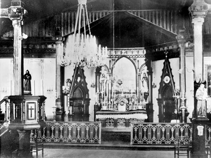 часовня католическая приюта